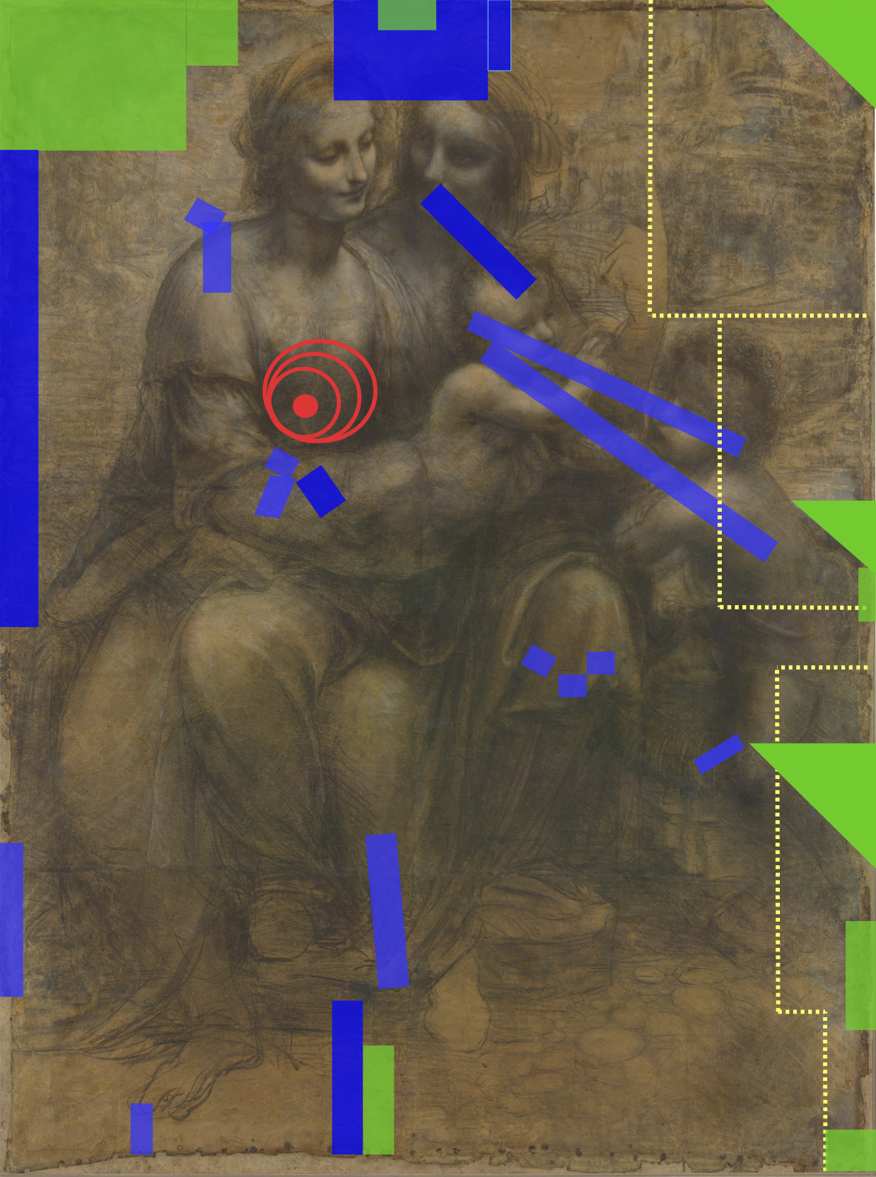 Schéma des pertes de matière, des réparations et du coup de fusil subi en 1987